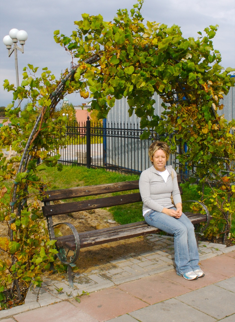 Vigne en arceau dans un jardin public de Zielona Góra